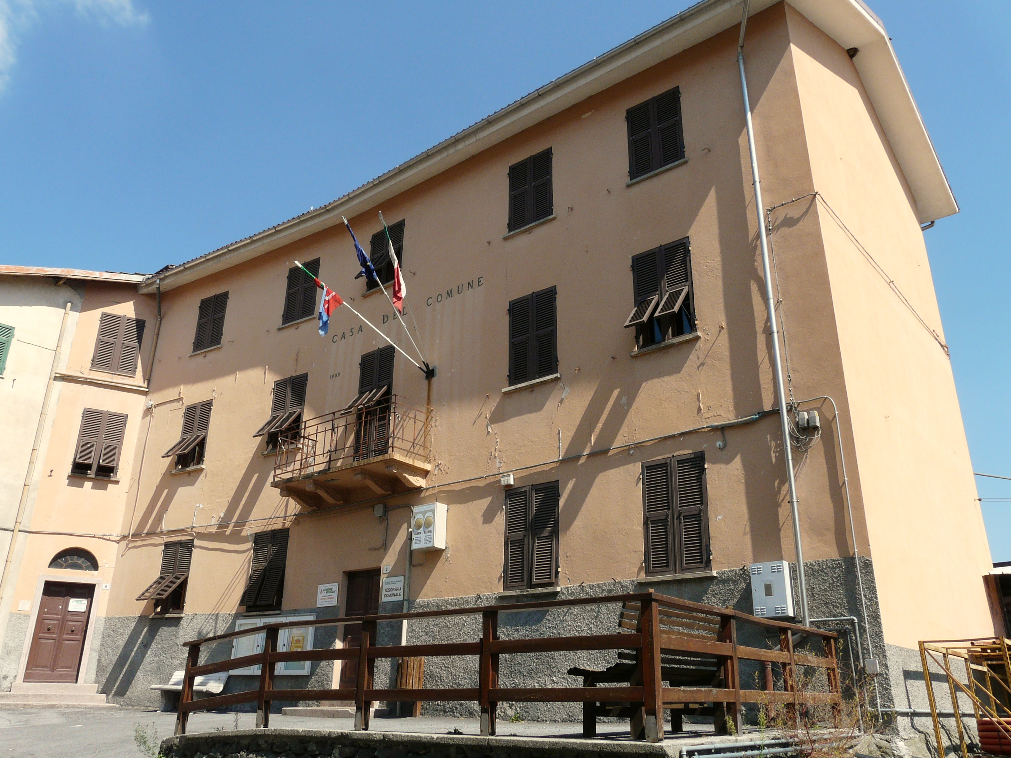 Municipio di Mioglia, Liguria, Italia